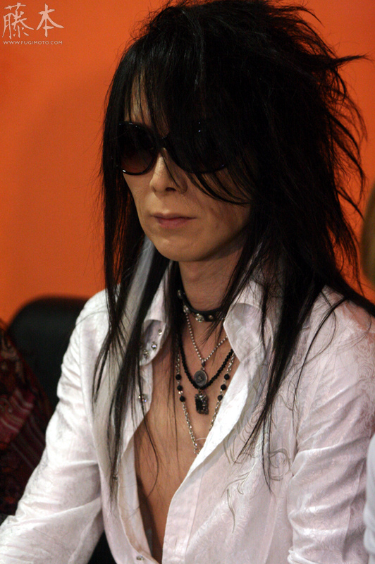 HSBC Brasil - São Paulo/SP - 11/09/2011